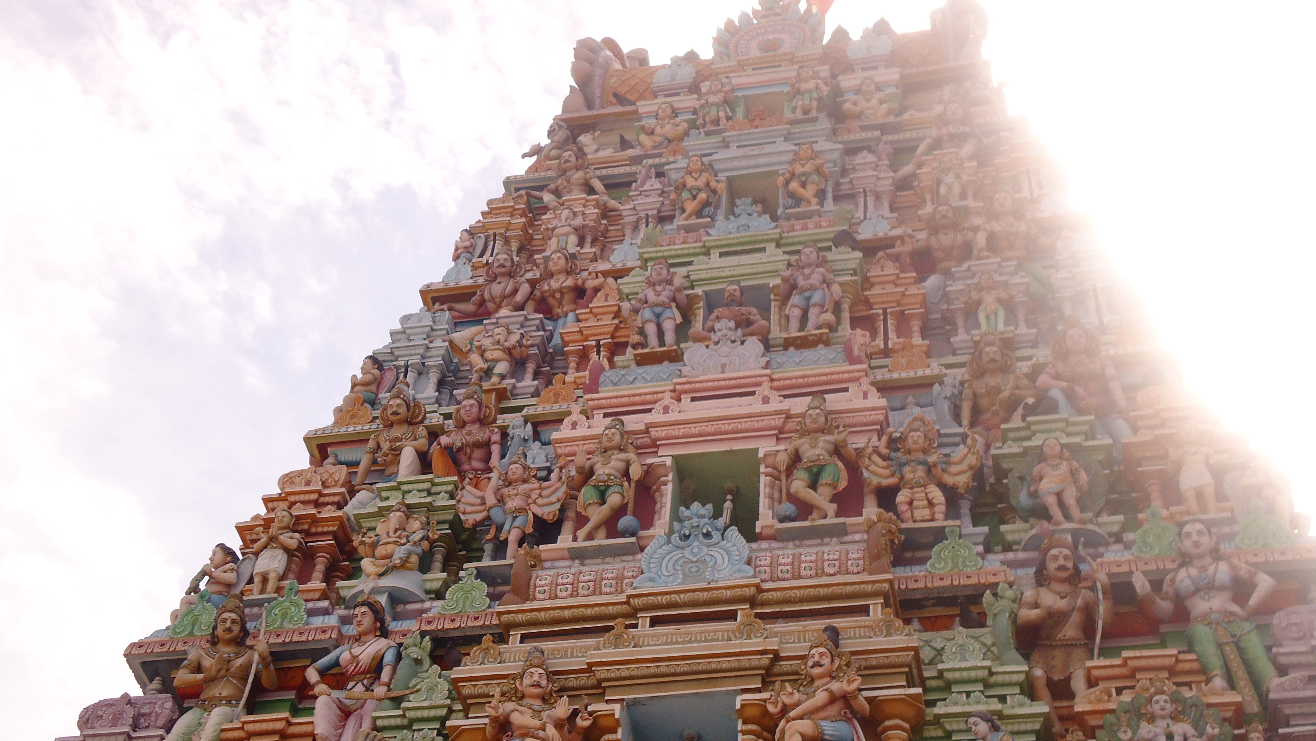 The great sivan kovil of northern province of srilanka (Thirukeetheeswaram)